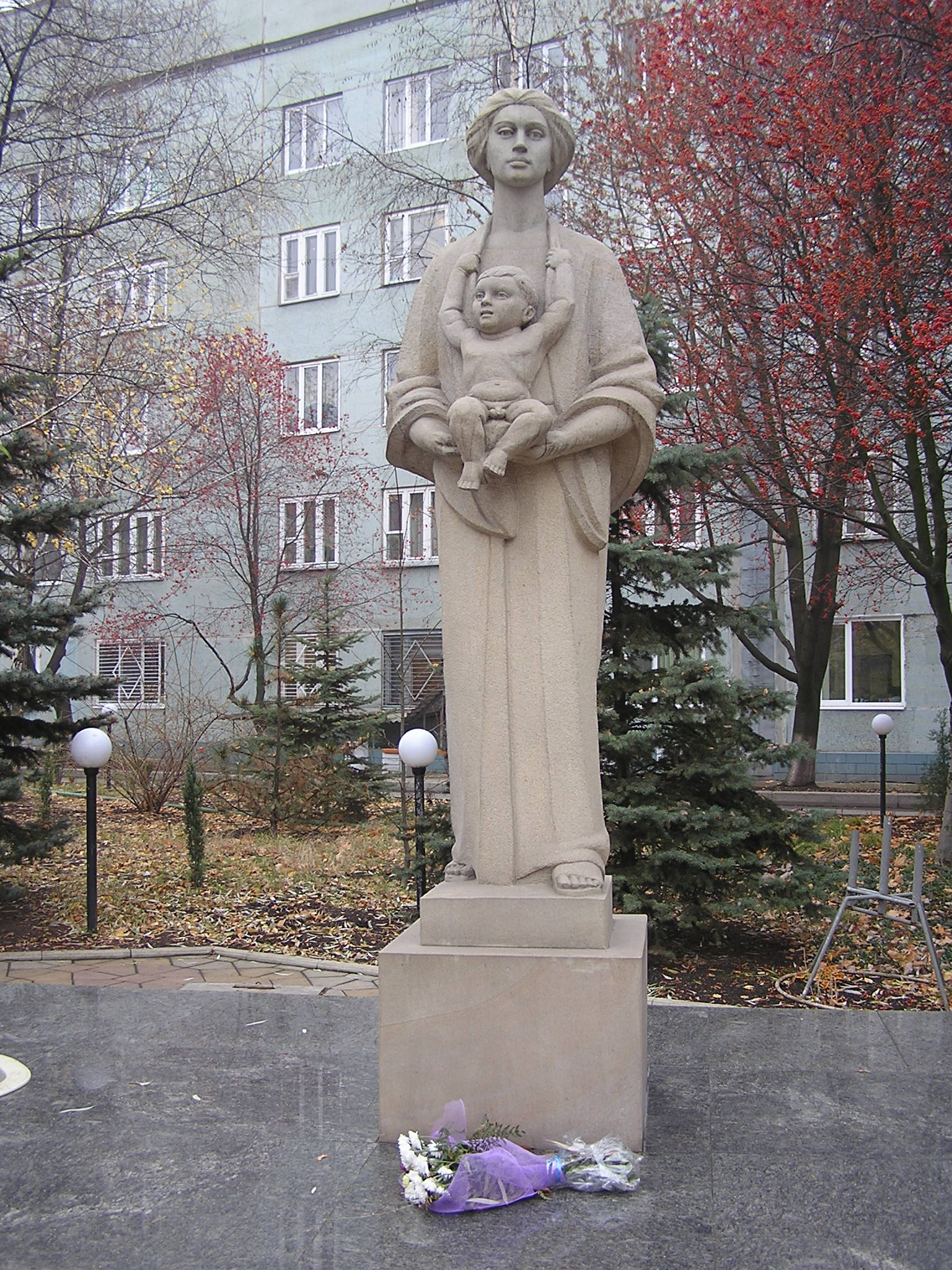 Памятник женщине-матери в Донецке